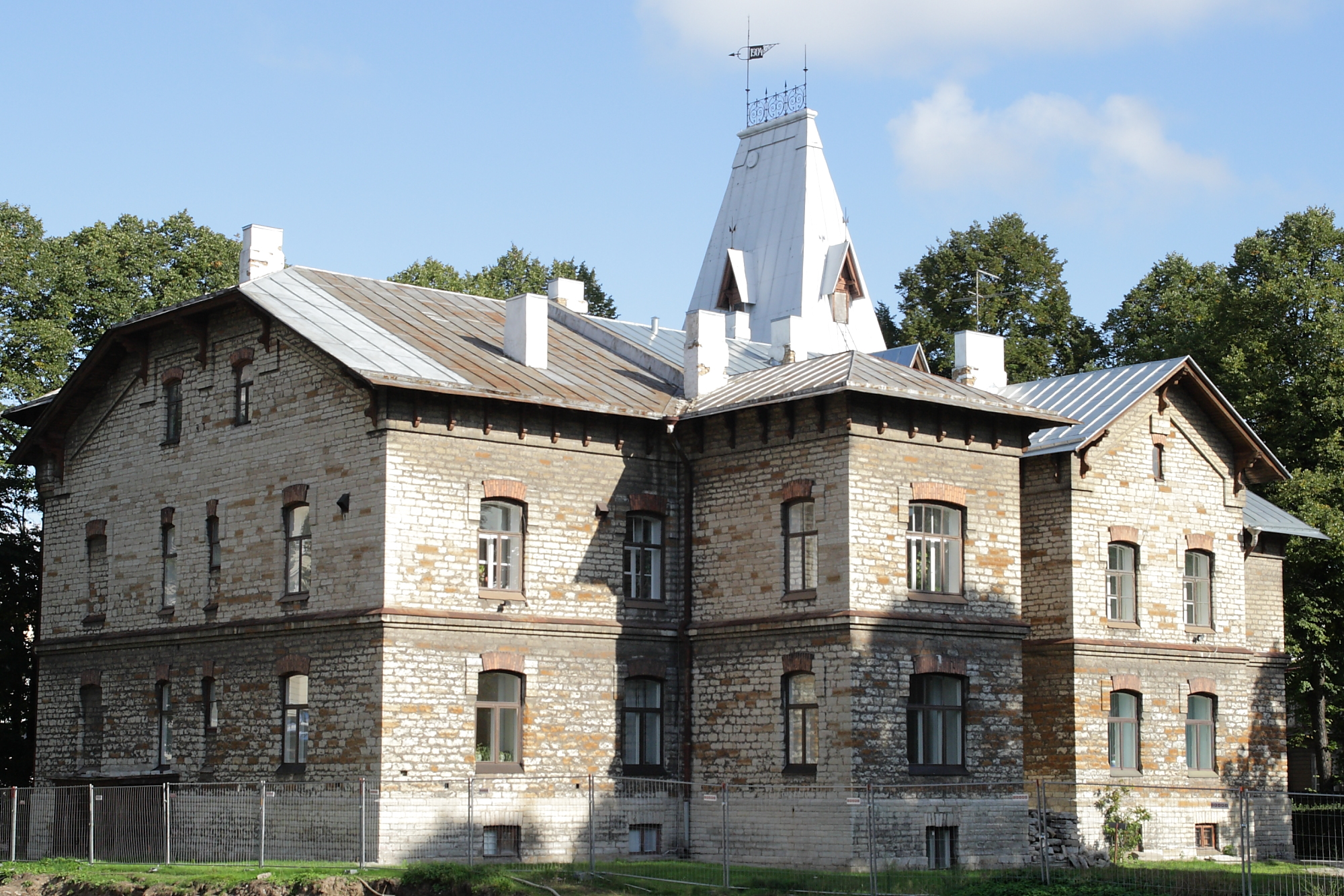 Tallinn, elamu Narva mnt 28, 1903